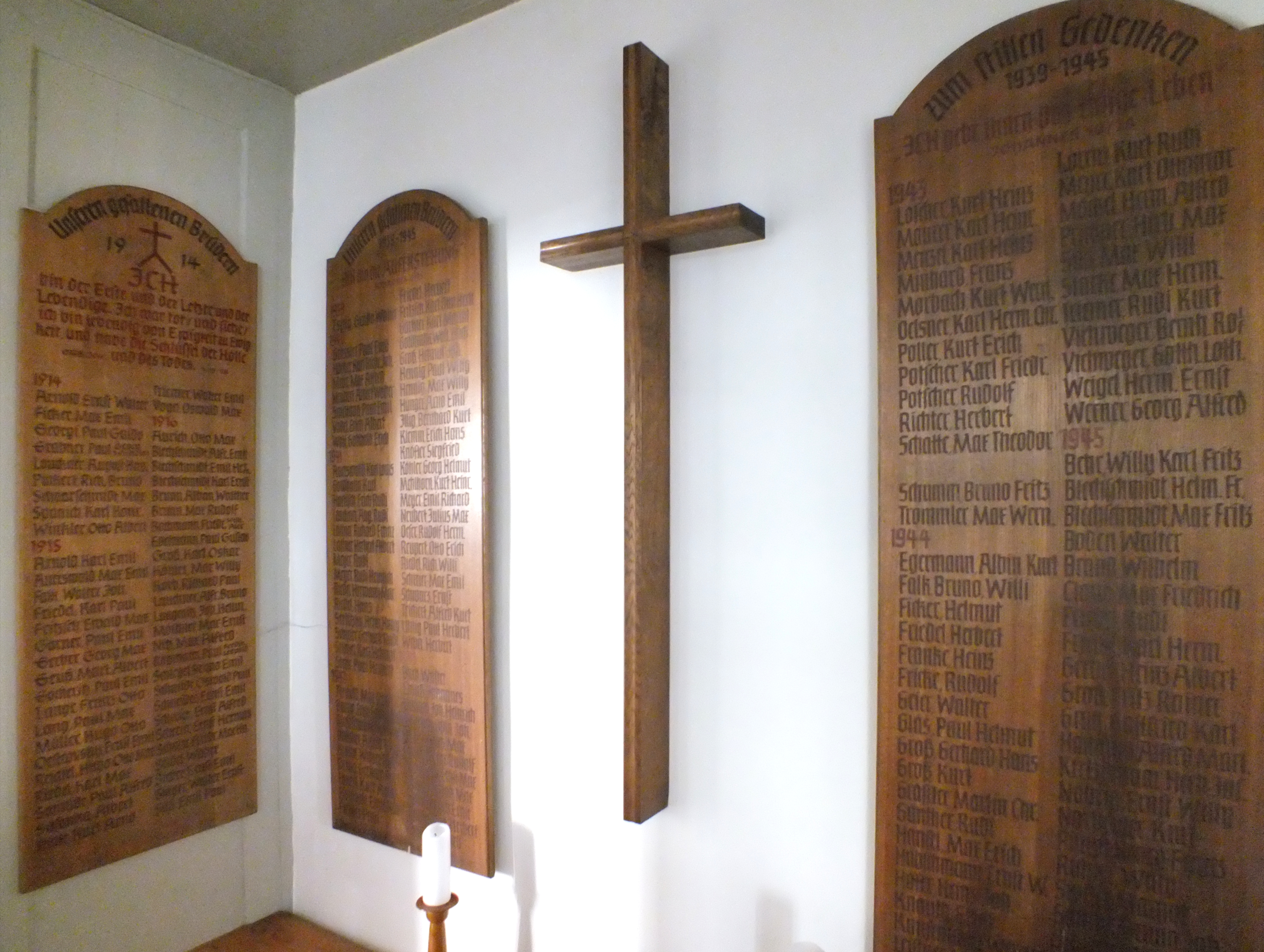 Nicolaikirche Grünhain